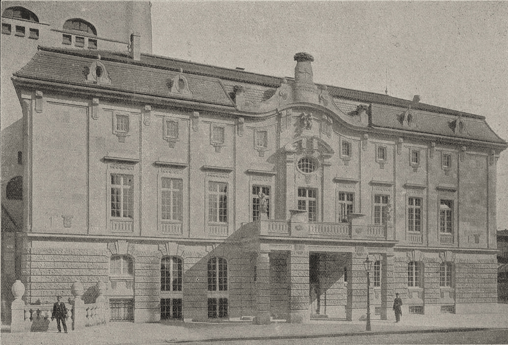 Düsseldorfer Schauspielhaus. Fassade an der Kasernenstraße, Bild aus der Denkschrift der Baufirma Boswau & Knauer, 1905